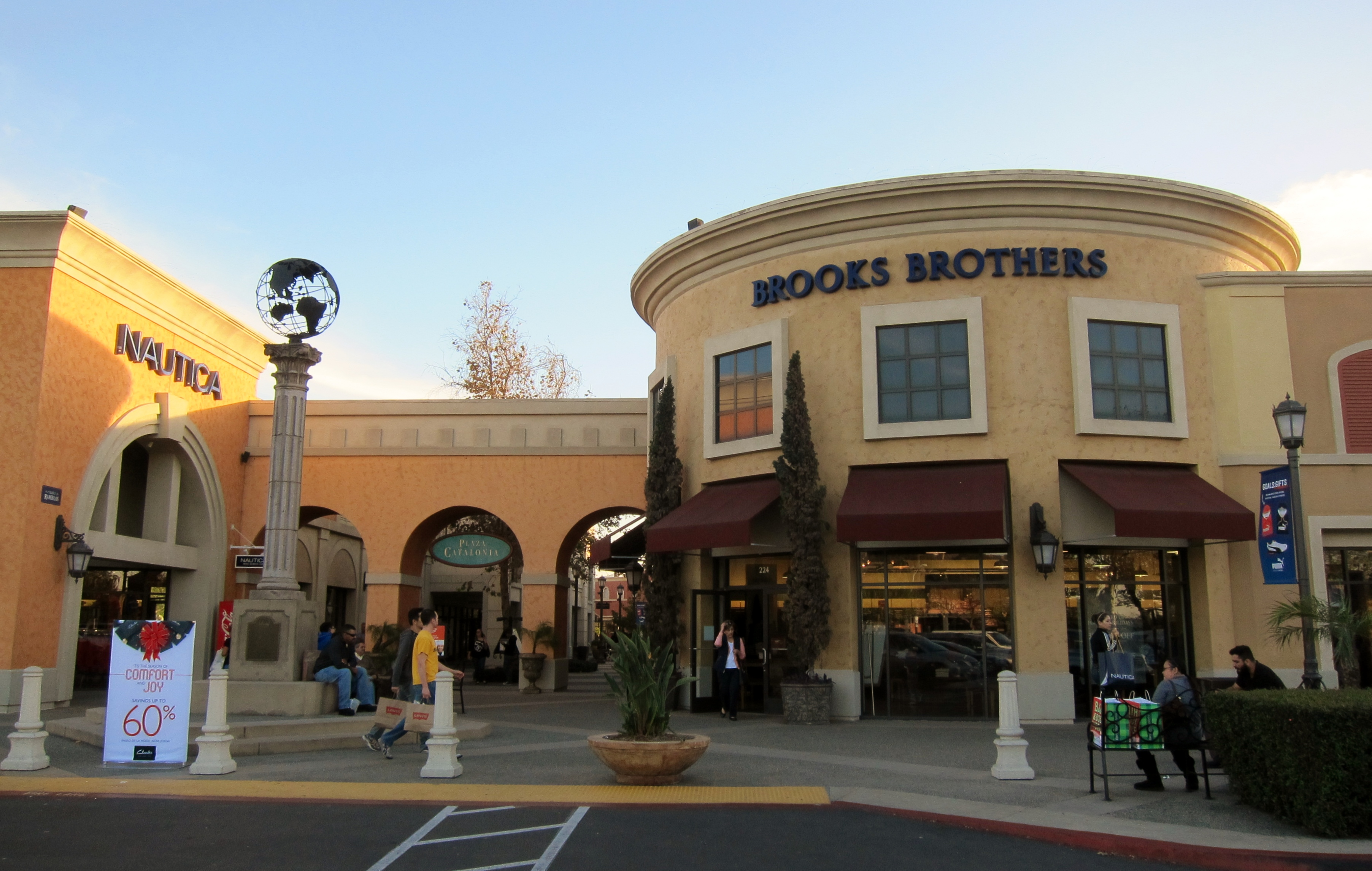 San Ysidro, San Diego, CA, USA